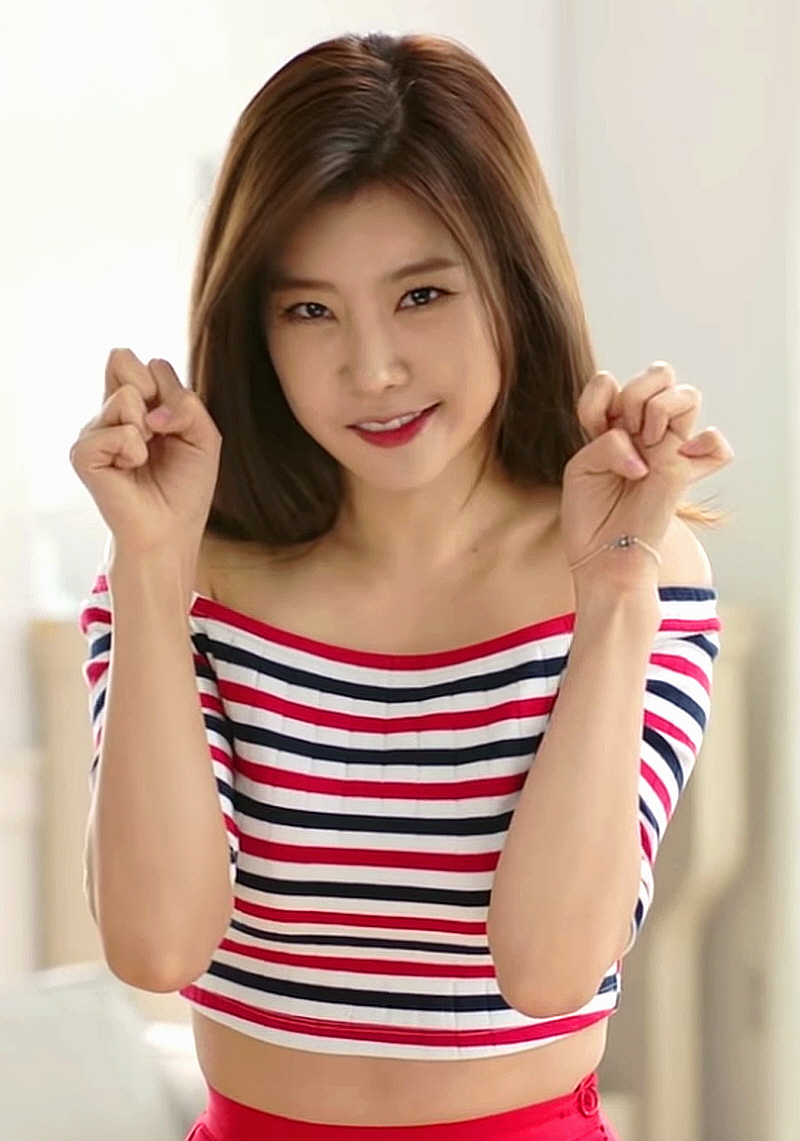 테일즈런너 스페셜 걸스데이 소진